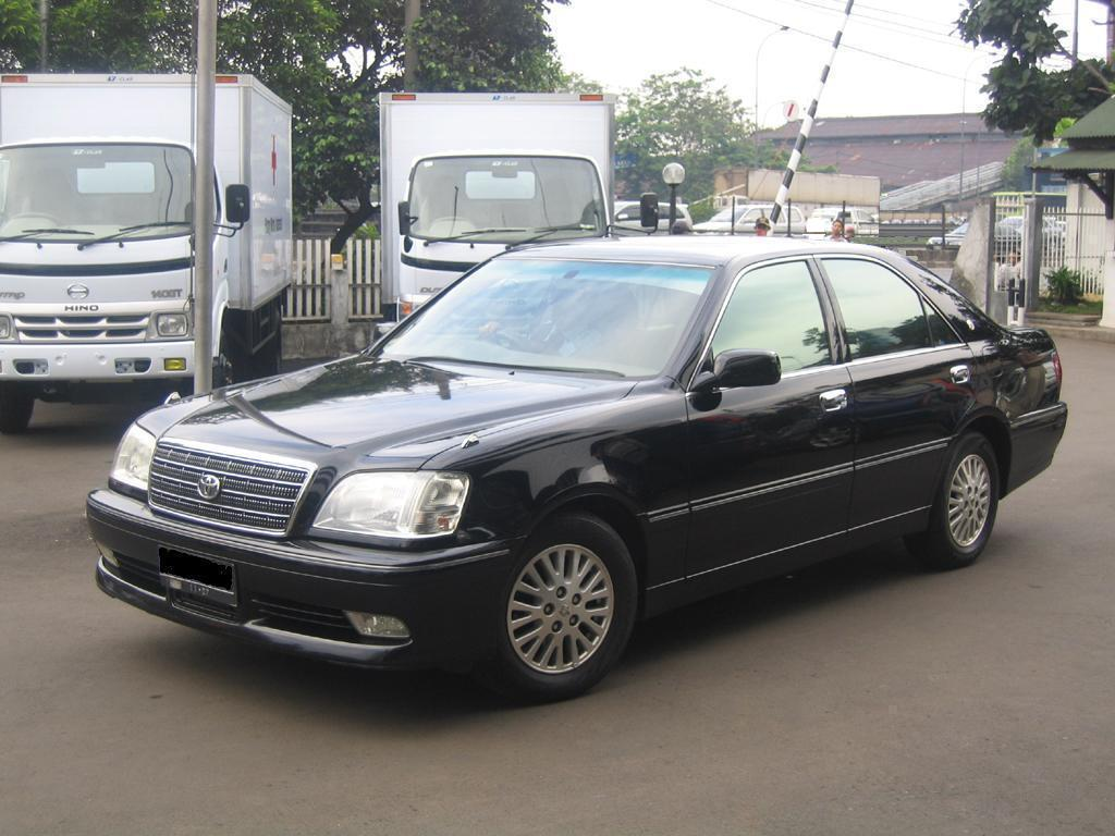 Crown Royal Saloon.